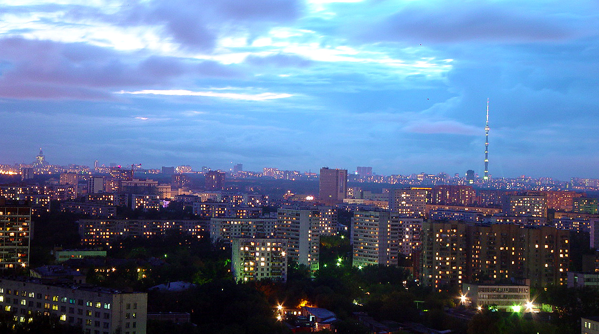 Вечерний город